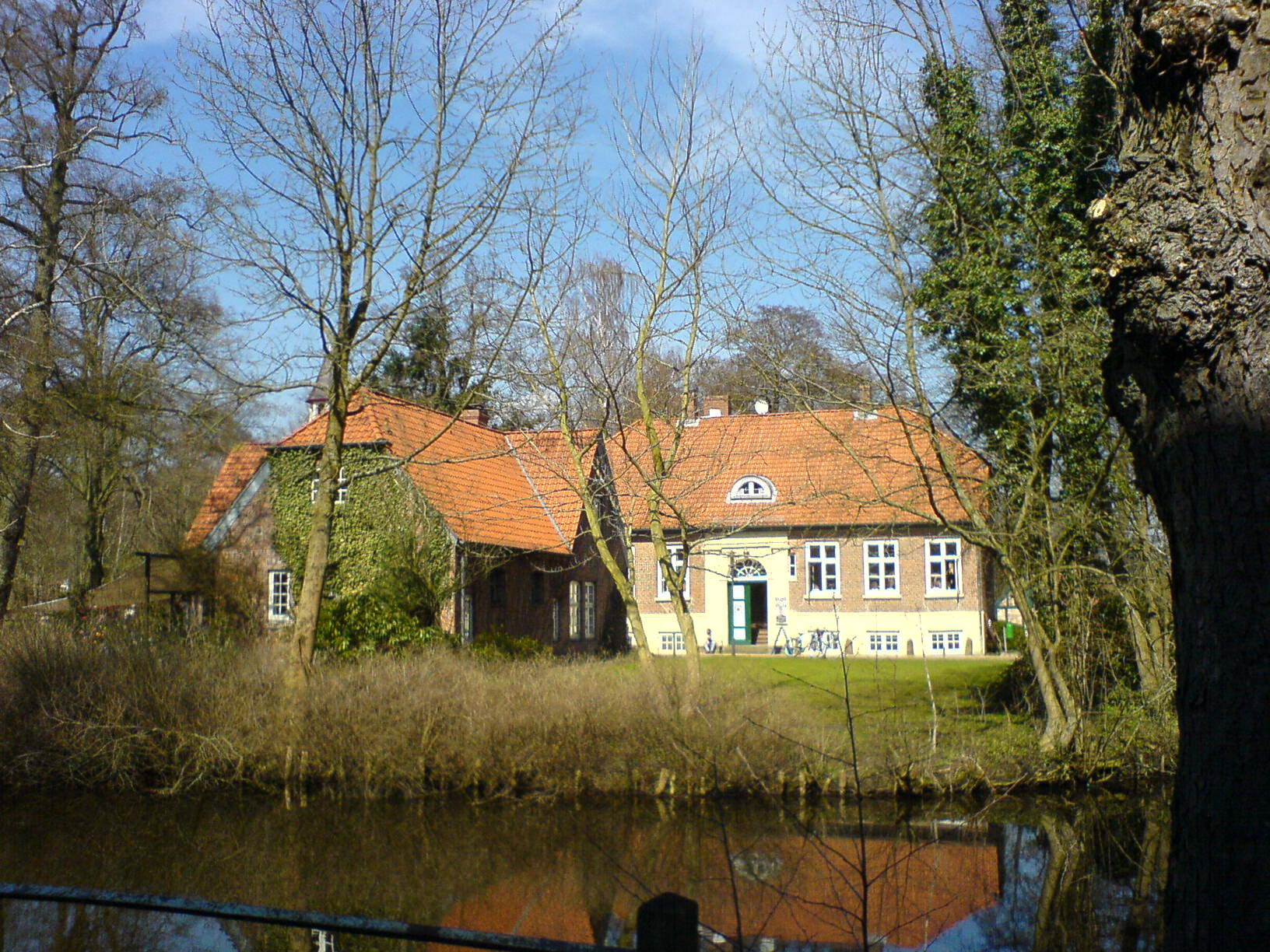 Herrenhaus